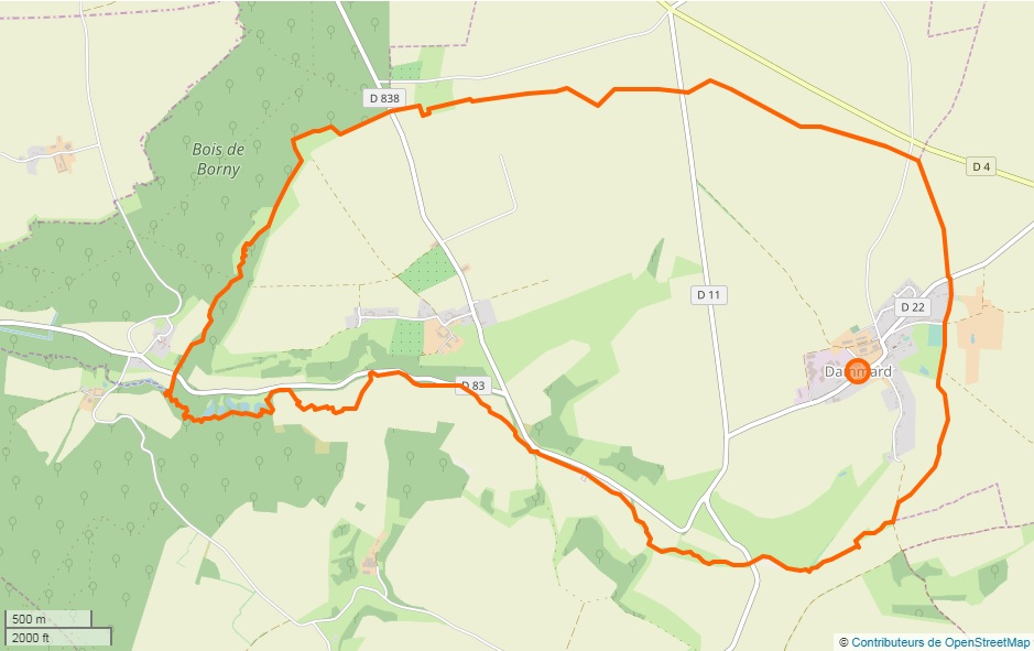 Carte commune de dammard avec limite territorial